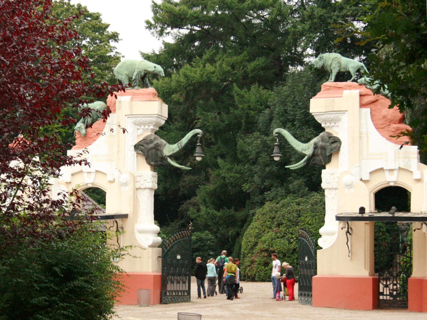 Tierpark Hagenbeck